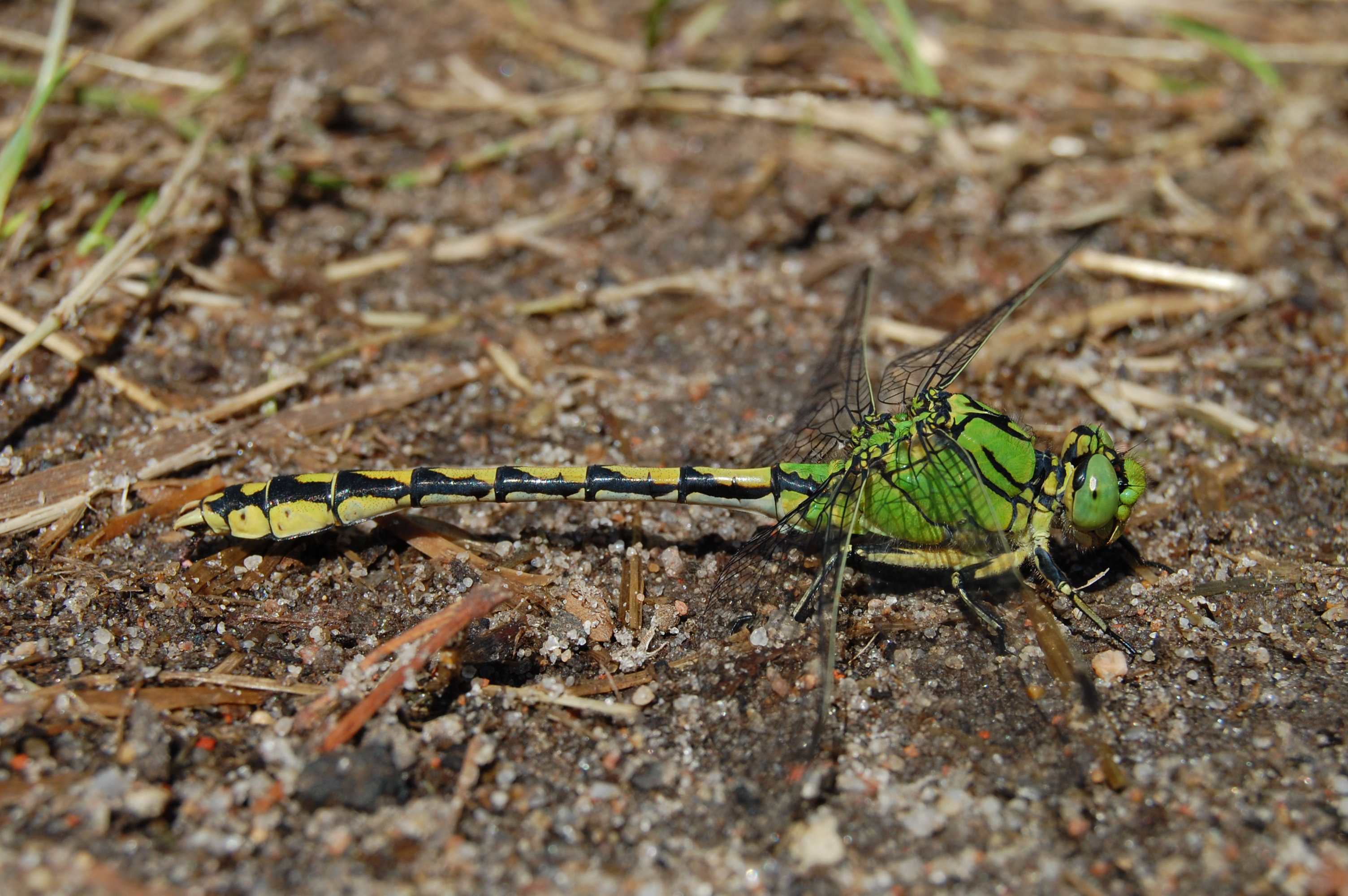 Ophiogomphus cecilia, Männchen. Nähe Bialogard, Zachodniopomorskie, Polen. Das Tier befand sich weit entfernt vom nächsten Fließgewässer auf einem sonnigen Feldweg